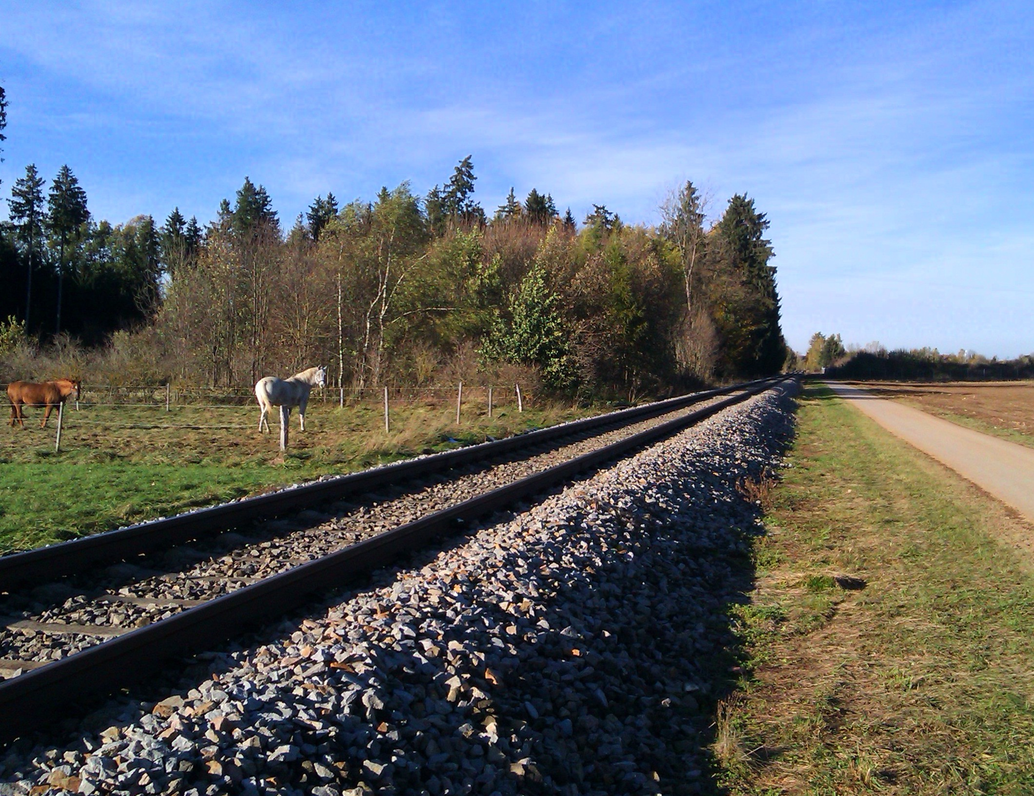 Bahnlinie Türkheim-Bad Wörishofen